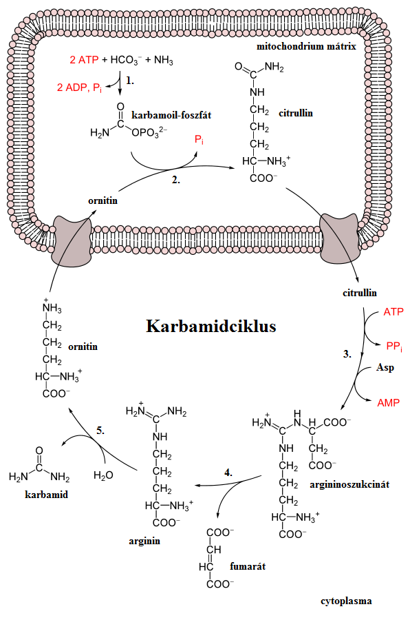 A karbamidciklus reakciói: 1. karbamoil-foszfát-szintetáz I 2. ornitin-transzkarbamoiláz 3. argininoszukcinát-szintetáz 4. argininoszukcinát-liáz / argininoszukcináz 5. argináz